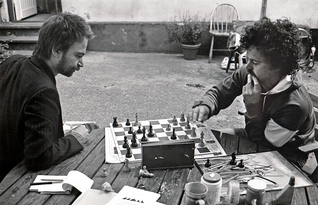 Fredrik Ekelund (th) vid draget mot vännen Ronald. Malmö 1988.